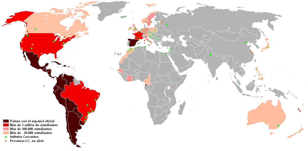 Estudio del español